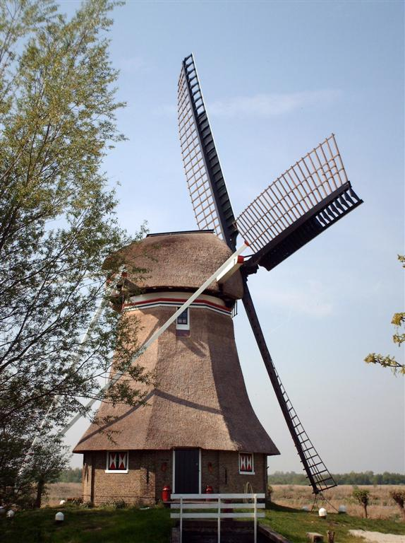 De Reiger, molen bij Nijetrijnje